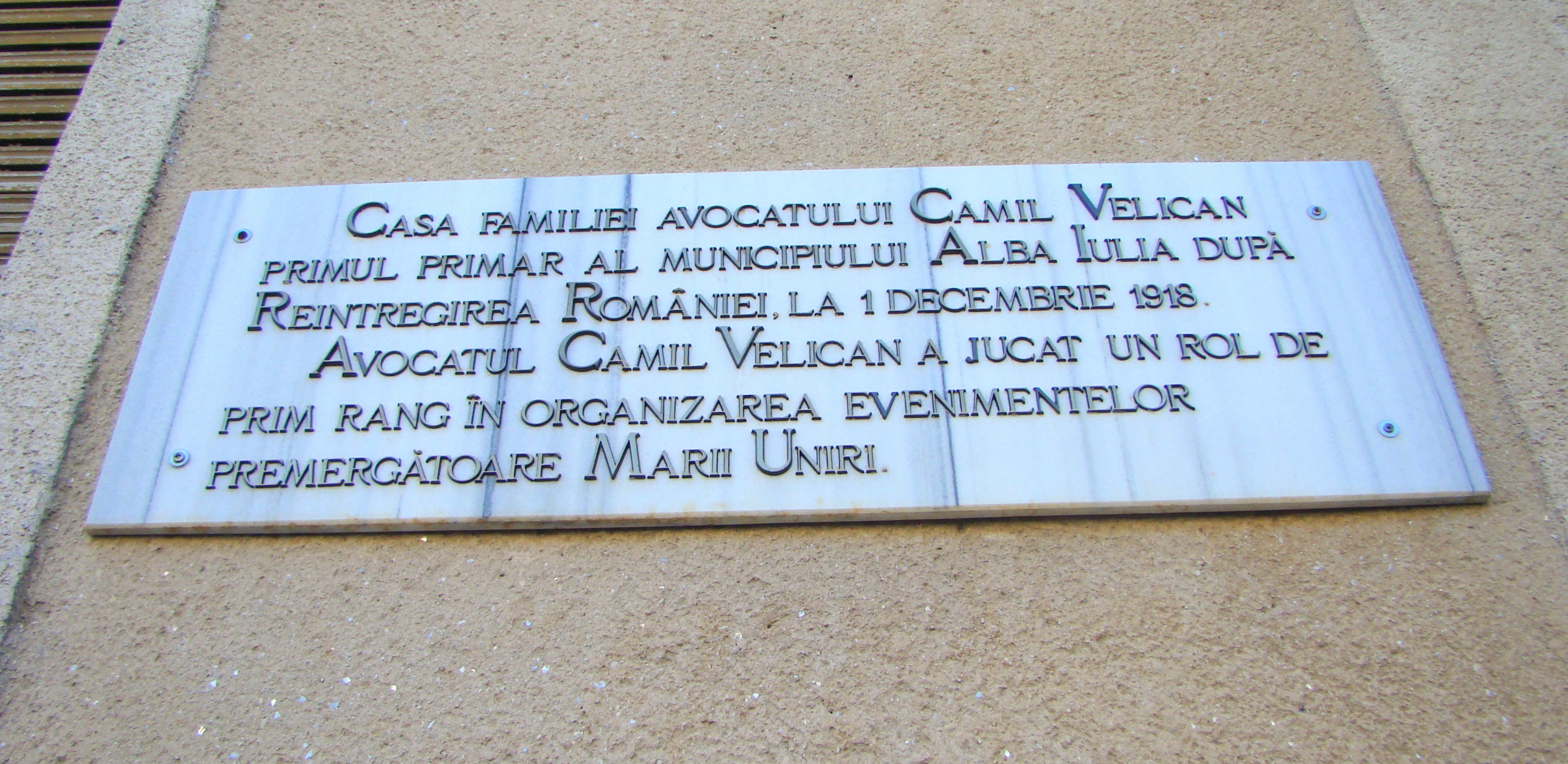 Casa Camil Velican, Str. Trandafirilor 11, municipiul Alba Iulia